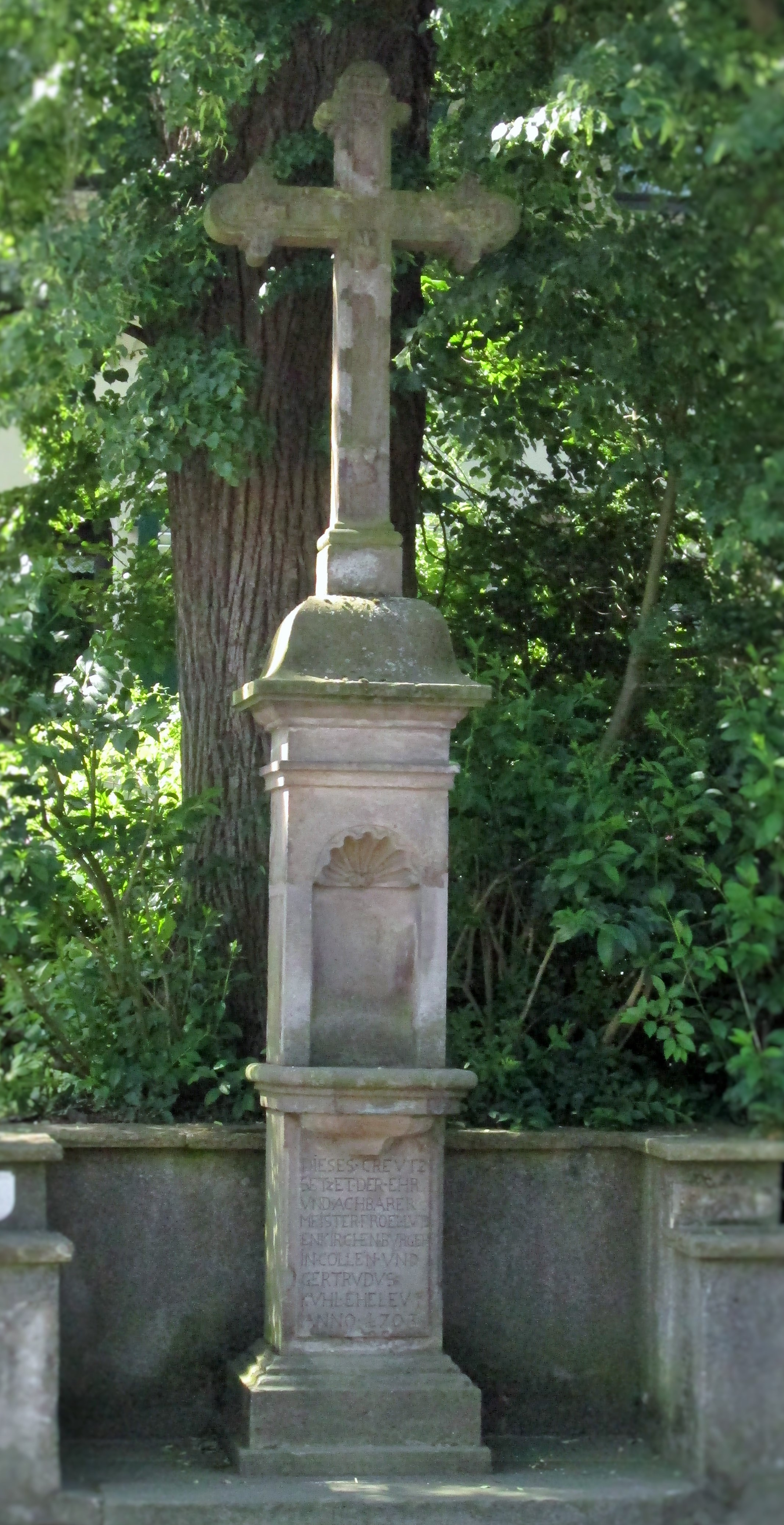 Hagelkreuz. Leverkusen-Quettingen, Quettinger Straße 47